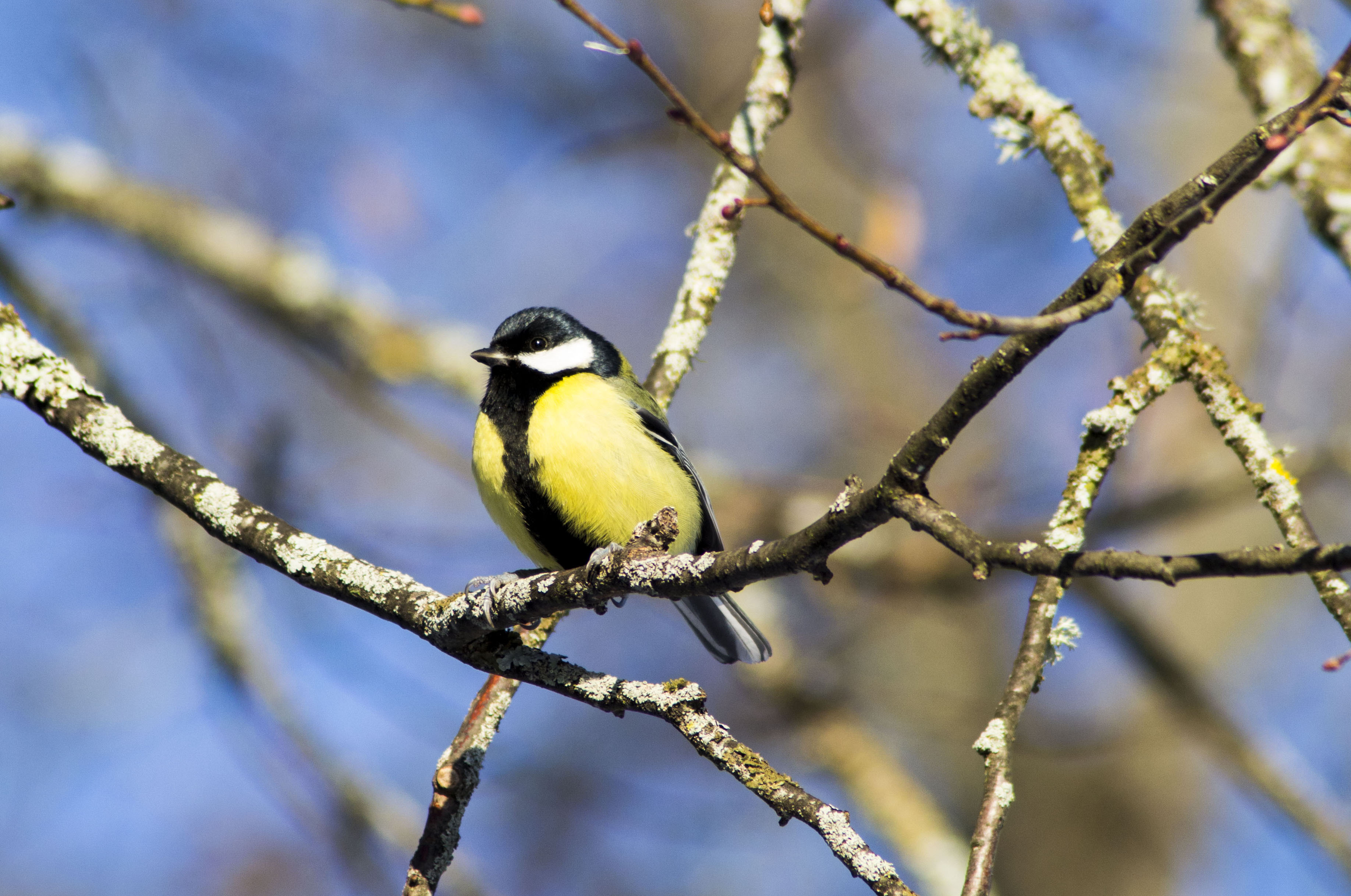 Rasvatihane Kaagvere mõisa pargis.